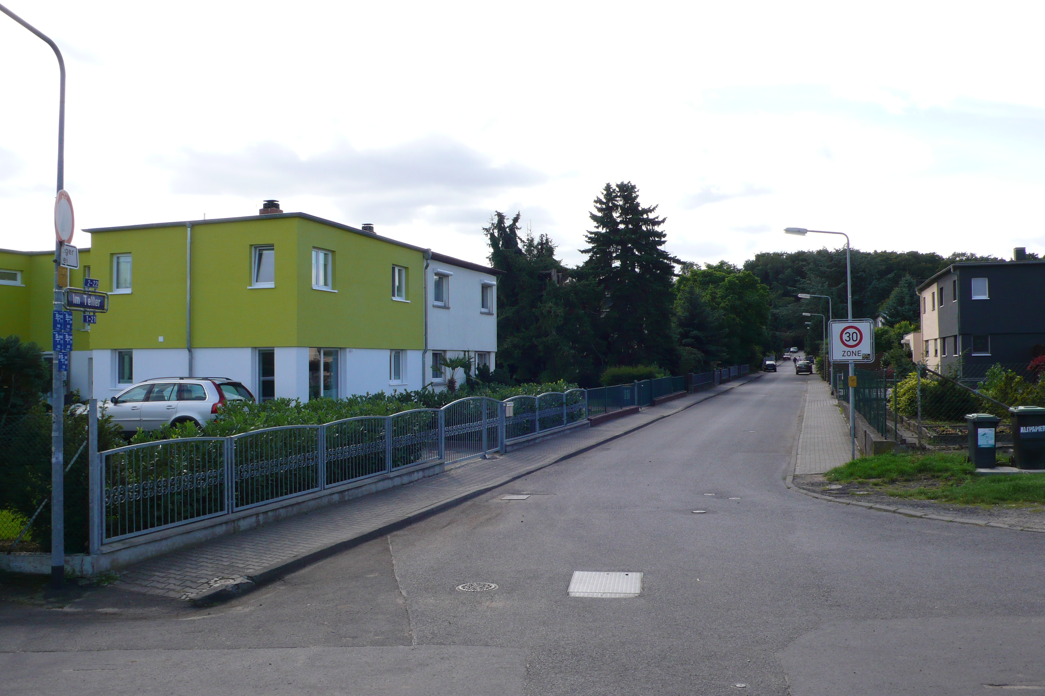 Gärtnereisiedlung "Im Teller" von Ernst May aus dem Jahr 1927 von Norden